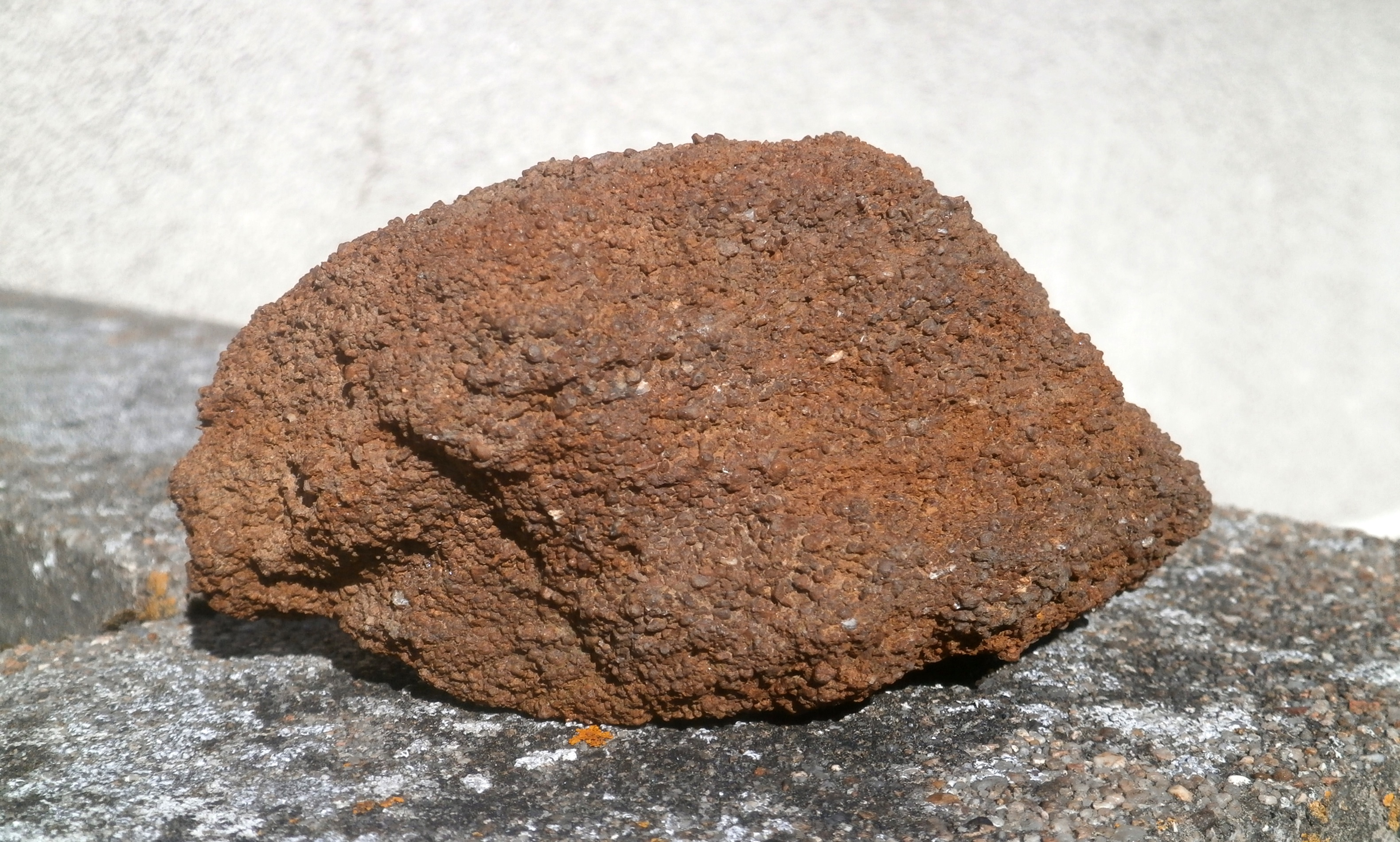 Moellon de grès roussard (Cherré, Aubigné-Racan, Sarthe, France)